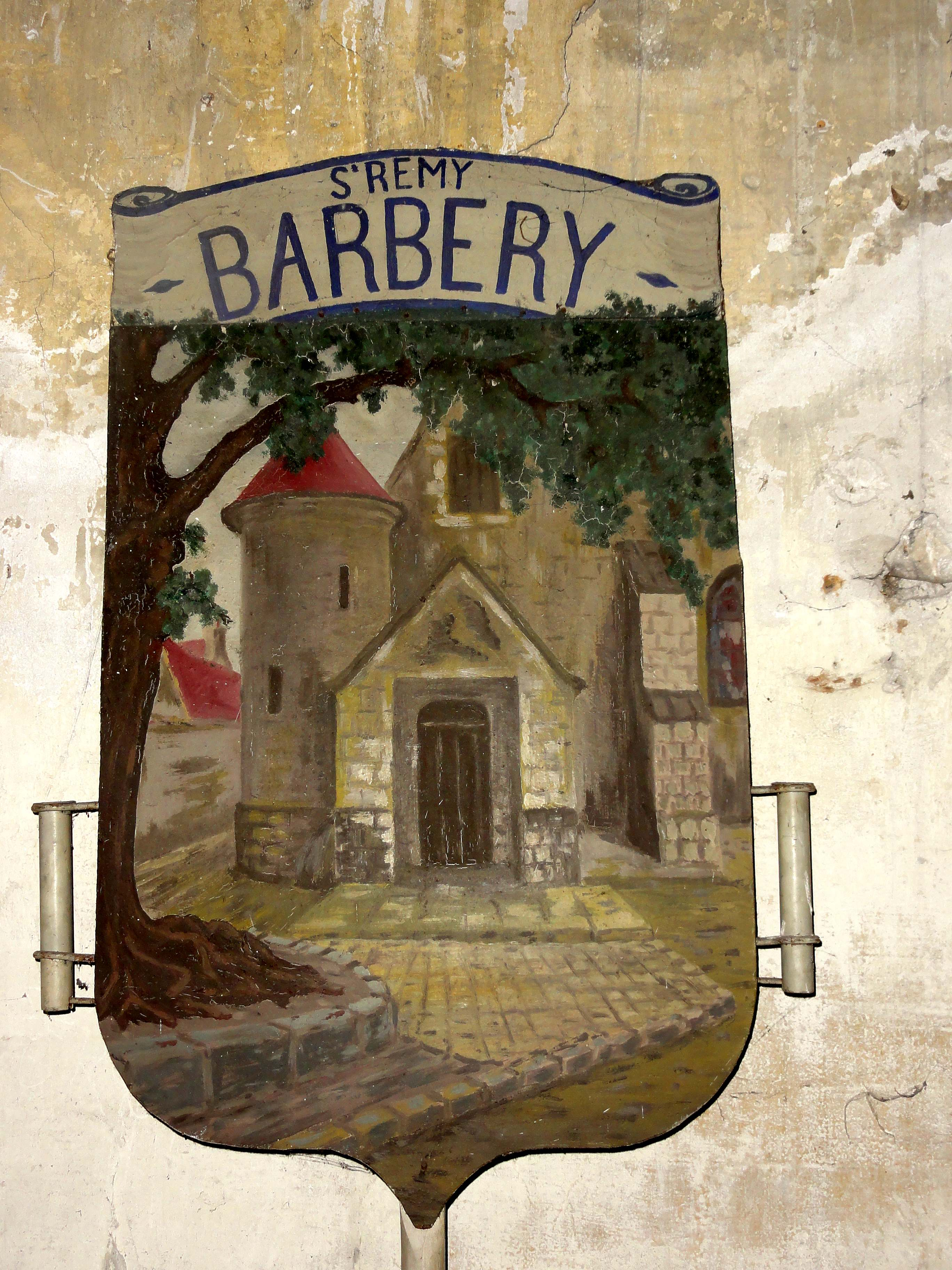 Mobilier de l'église (voir titre).